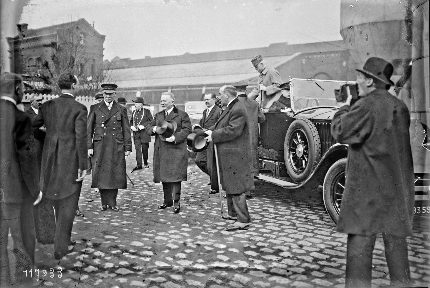 Roubaix, 4-4-27, le président Doumergue à l'usine Prouvost - (photographie de presse) - (Agence Rol)